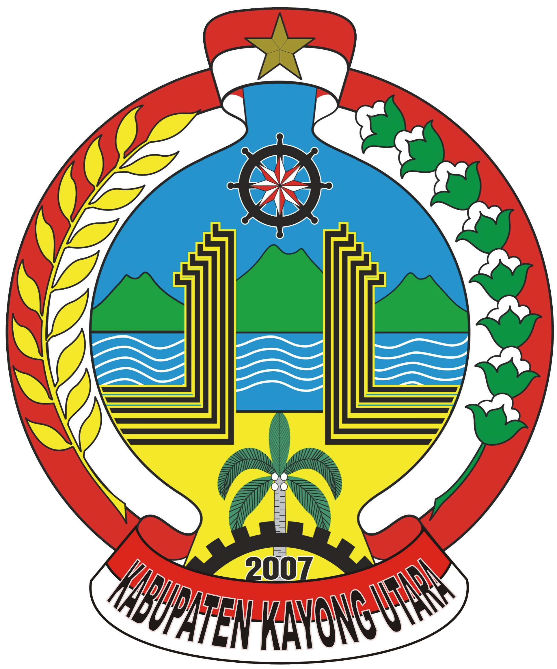 Lambang Daerah Kab. Kayong Utara